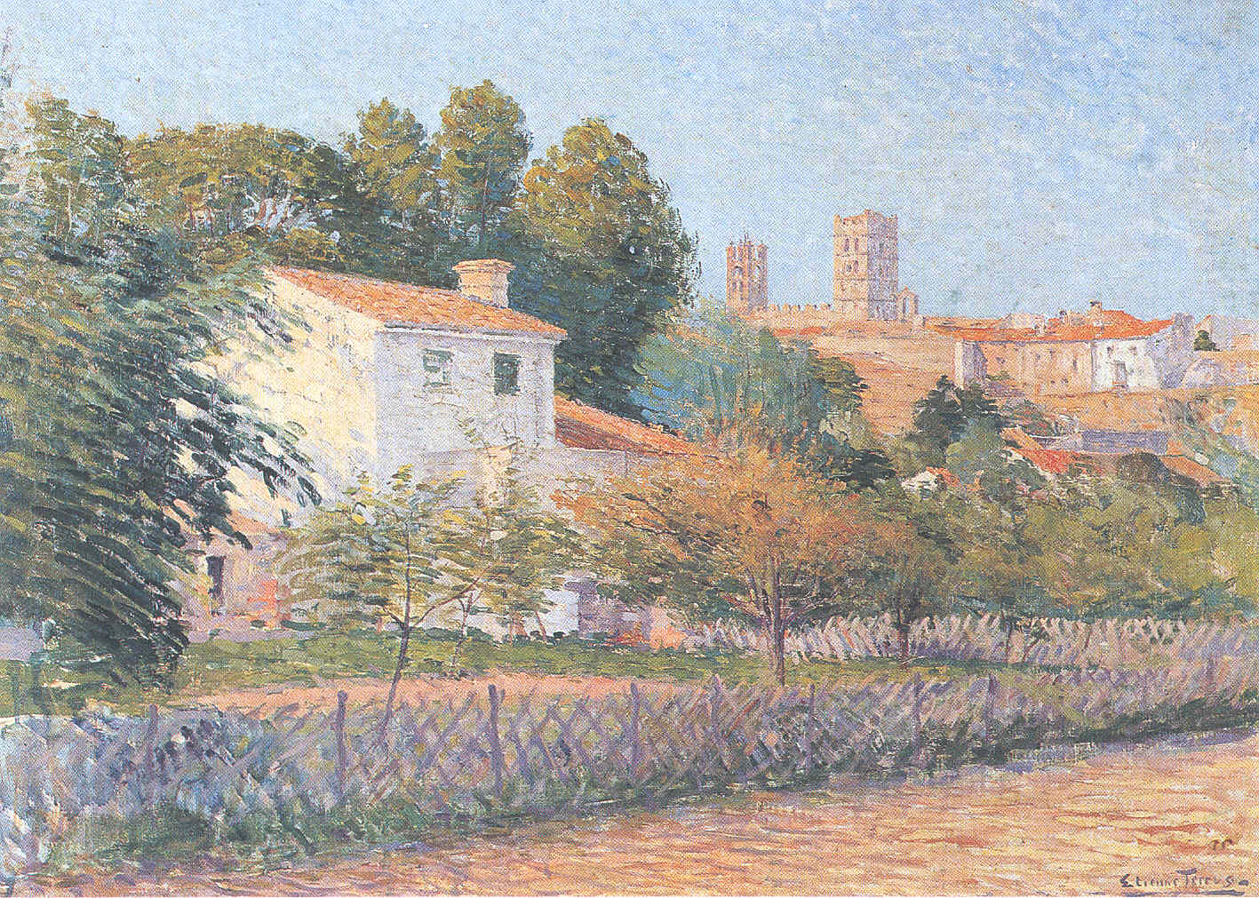 Attribué à Étienne Terrus, Vue d'Elne, localisation inconnue.